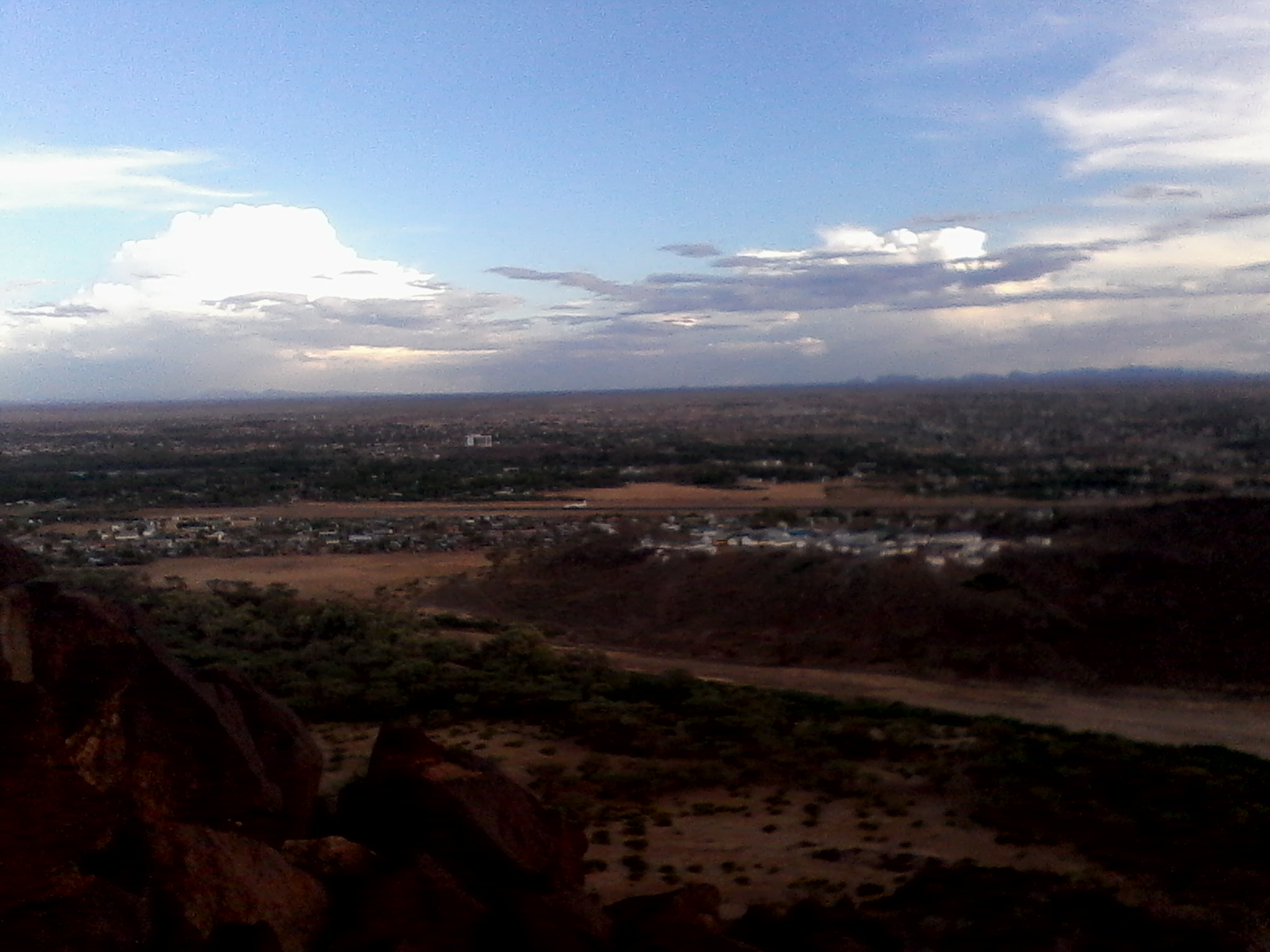 Kiswahili: Kituo cha ndege, Lodwar